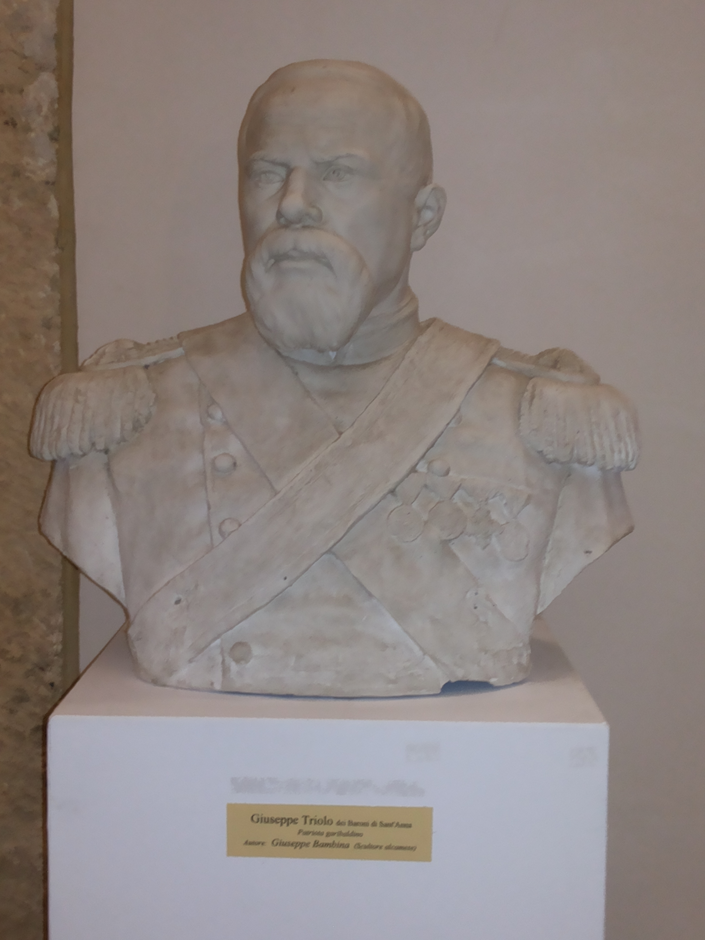 Busto in gesso opera di Giuseppe Bambina, biblioteca comunale di Alcamo